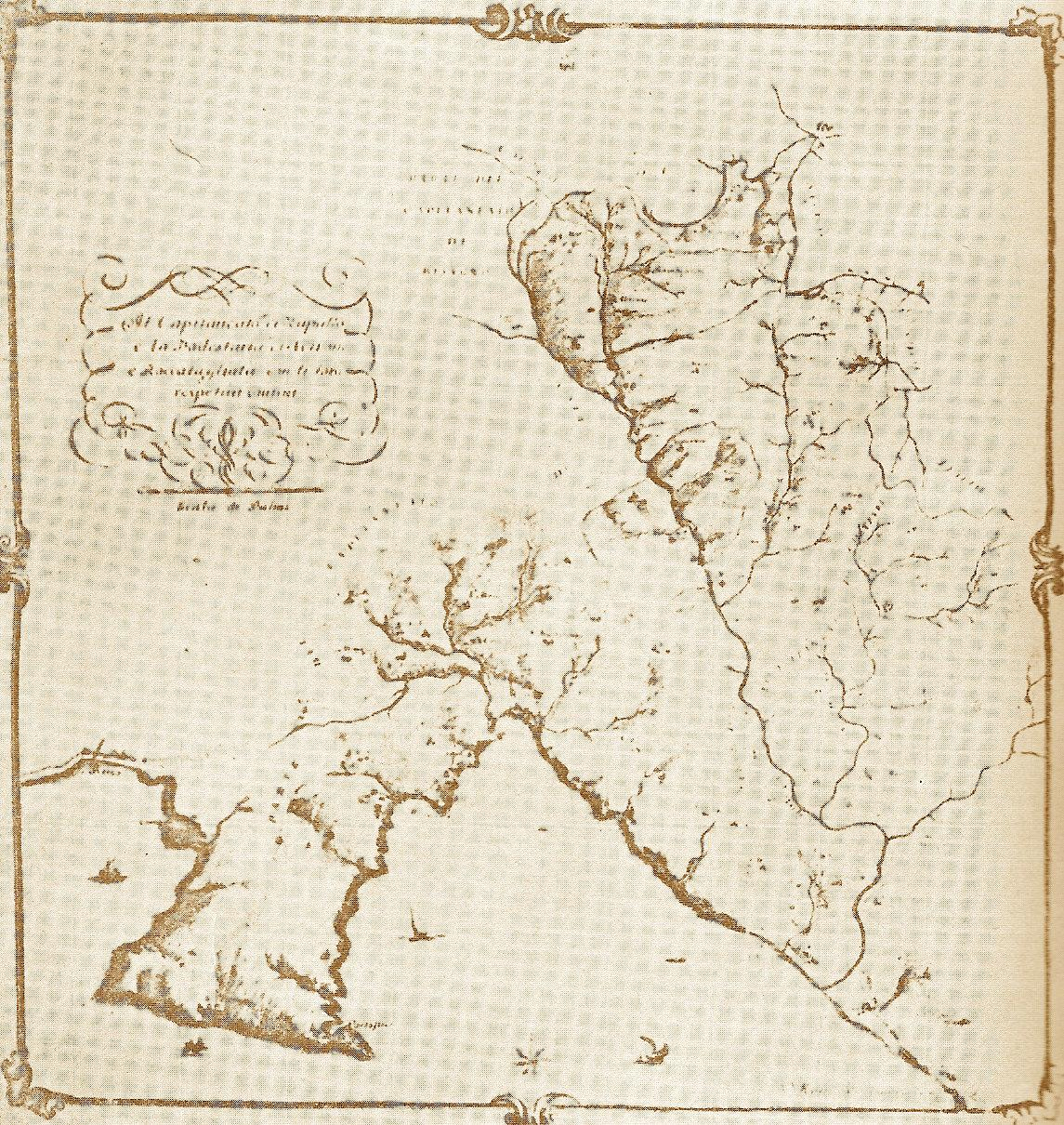 Mappa del XVII secolo del cartografo Matteo Vinzoni raffigurante i confini del Capitaneato di Rapallo